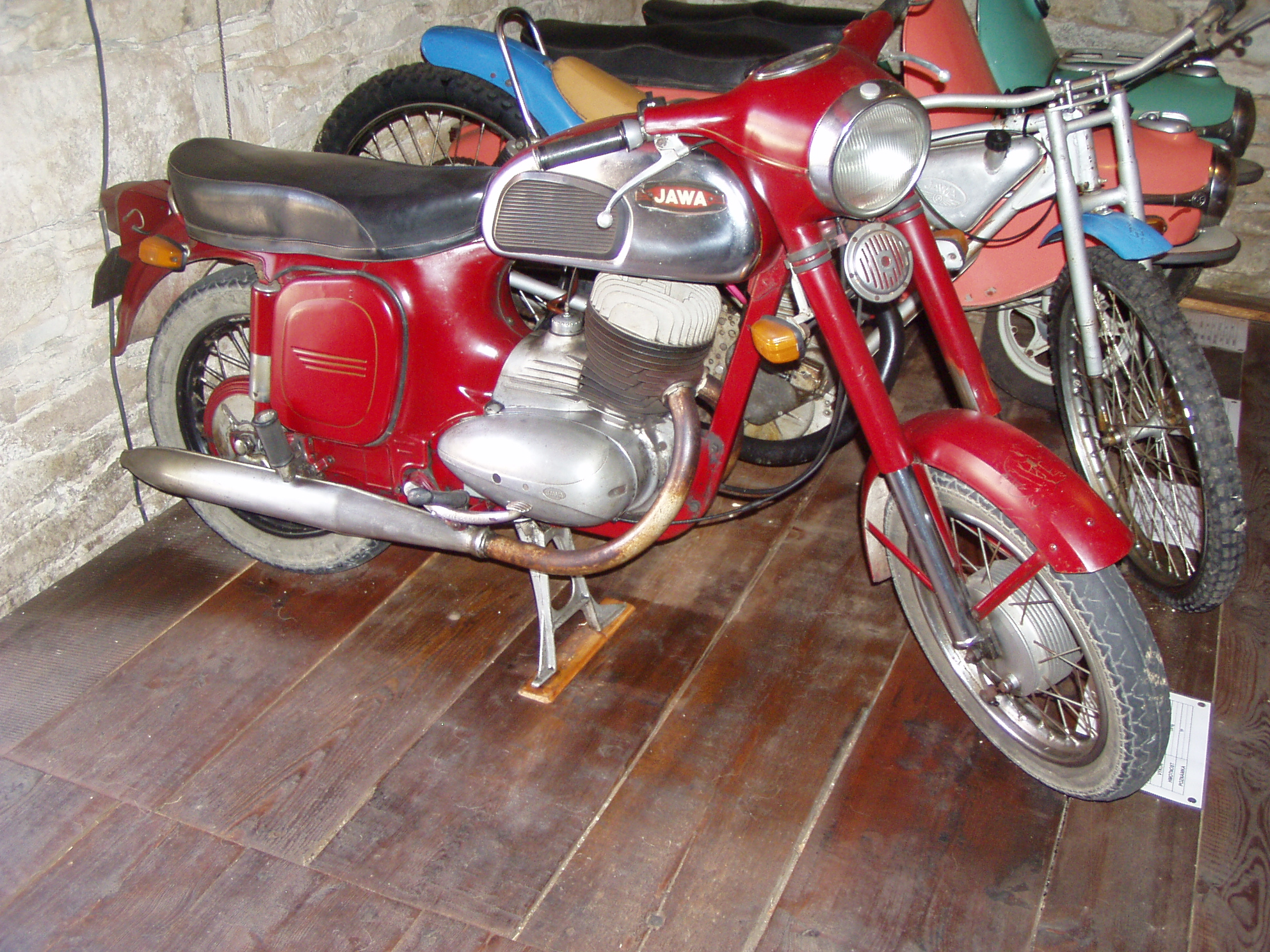 Jawa 250/592 (1971)